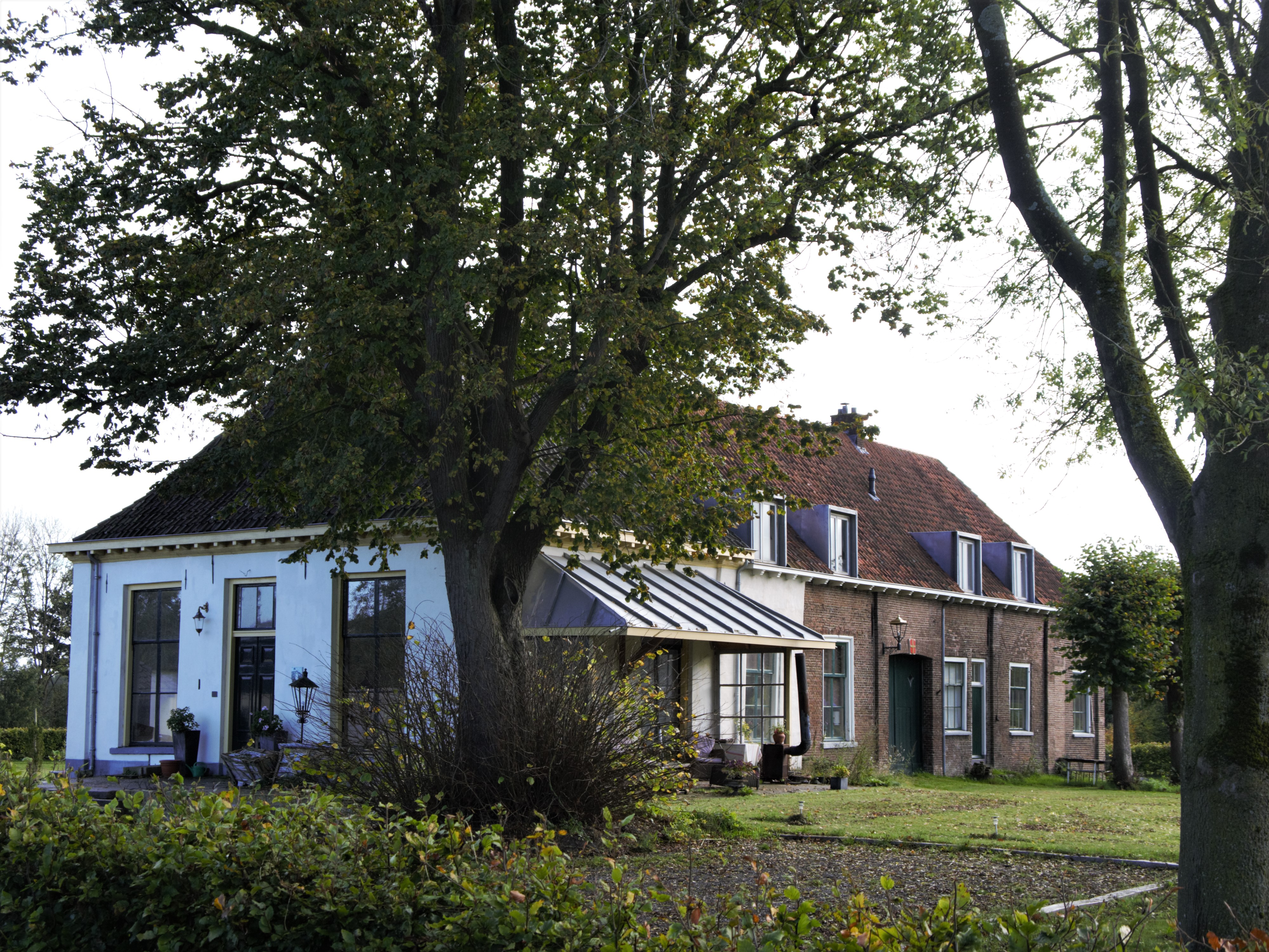 Na restauratie in 2012